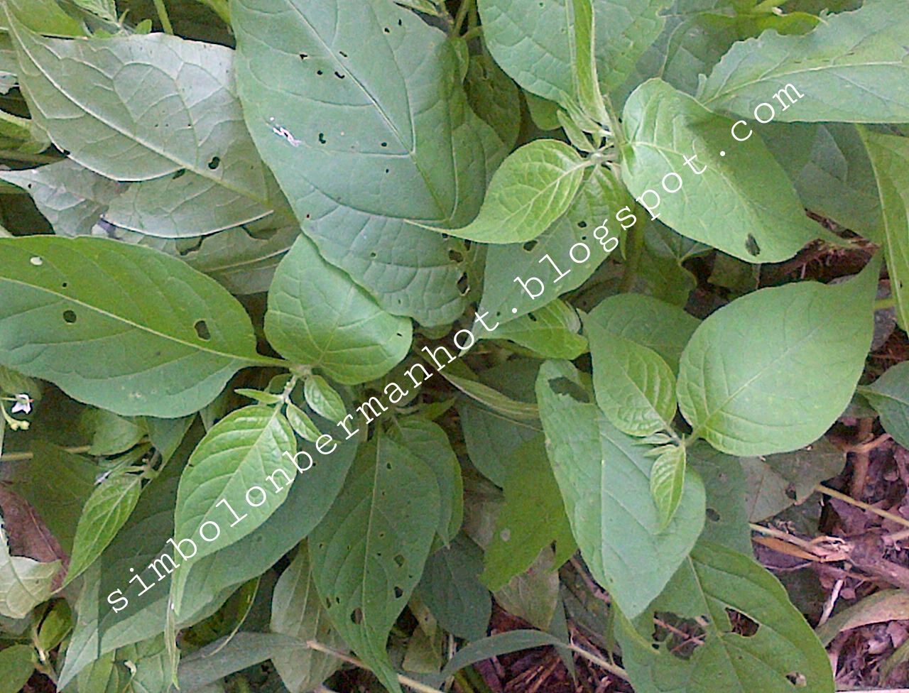 Tumbuhan Obat Batak